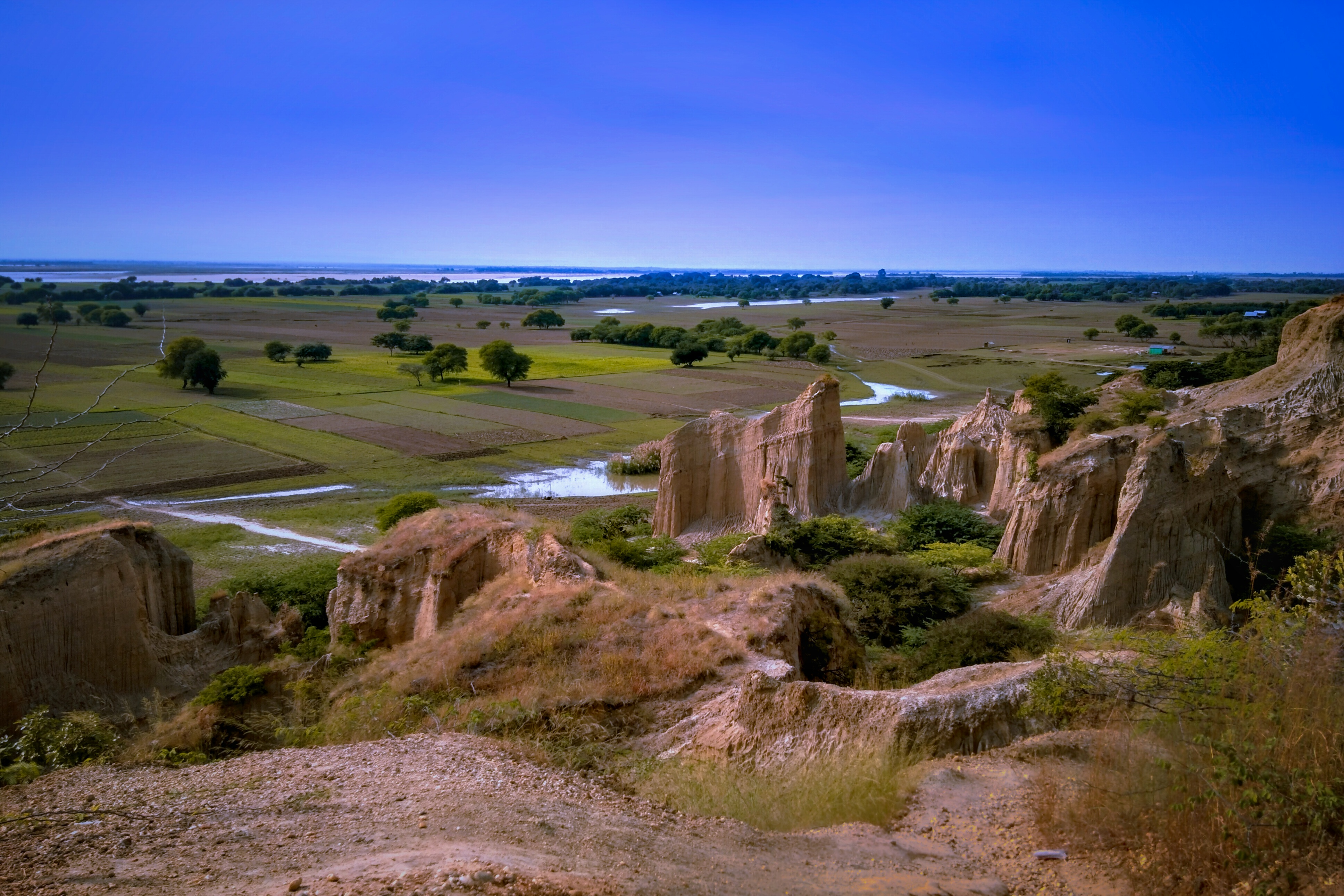 မြန်မာဘာသာ: ဖူးစာကုန်း သည် ရေနံချောင်းမှ မကွေးဘက်အထွက် လမ်းသွယ်ကြားတနေရာရှိ ဧရာဝတီမြစ်ကမ်းပါးဖြစ်သည်။ ရေနံချောင်းမြို့၏ ရှုခင်းကြည့်ရှုရန် ကောင်းမွန်သောနေရာဖြစ်ပြီး ၎င်းအပေါ်မှ ဧရာဝတီမြစ်အလှကိုကြည့်ရှုနိုင်သည်။ လူအများ အပန်းဖြေနားနေရာတခုလည်းဖြစ်သည်။